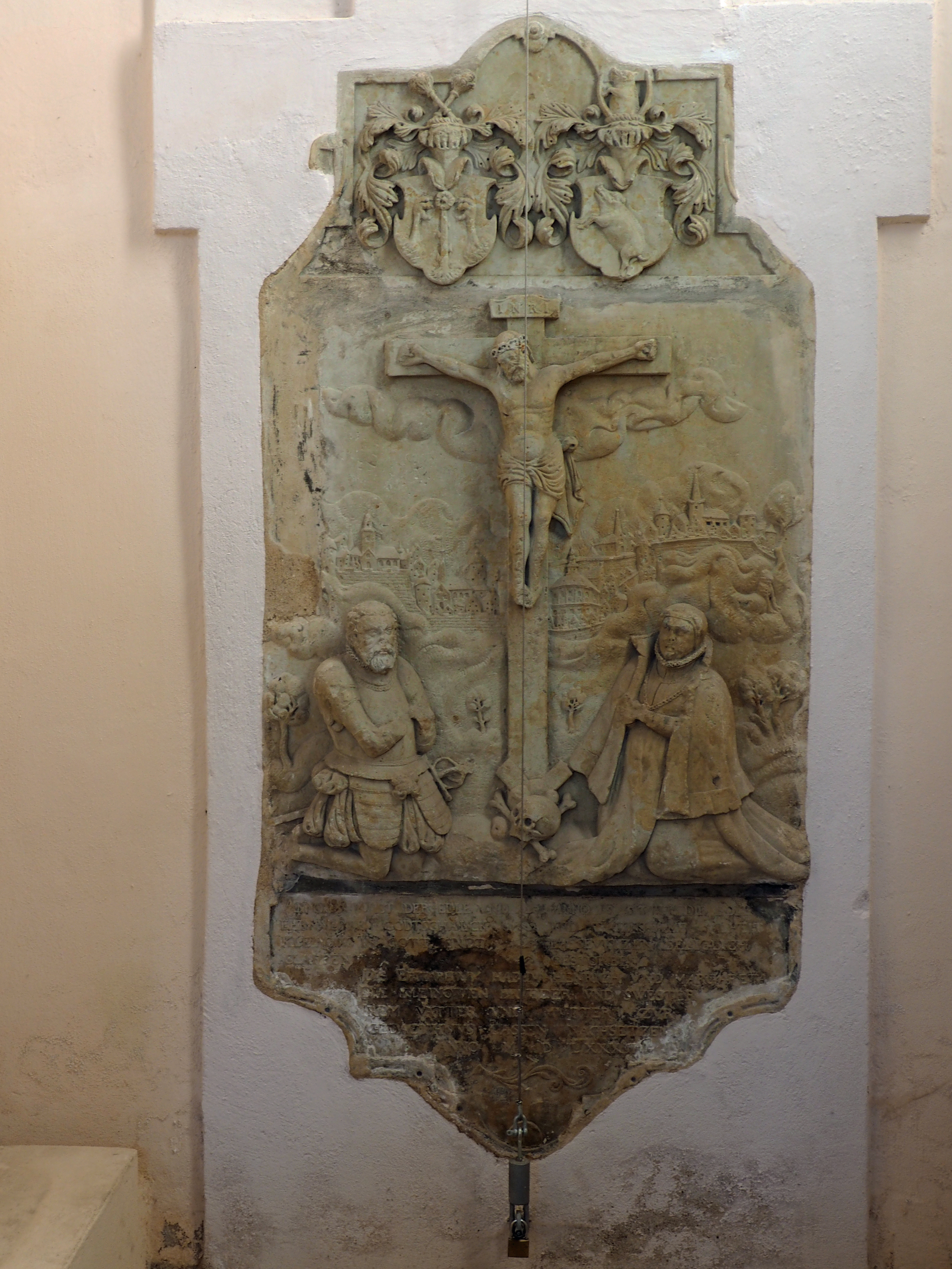 Epitaph von 1582 in der Stadtkirche Ludwigslust - Ritter Godtschal Klenow und Gemahlin